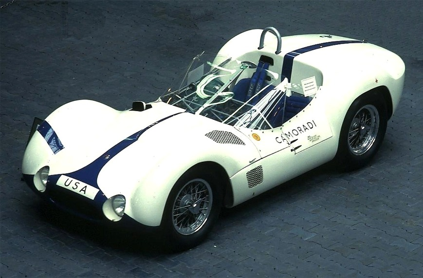 Bildbeschreibung: Maserati Tipo 61 "birdcage" Fotograf: Lothar Spurzem Datum: 1993 im Rennsportmuseum am Nürburgring Der genaue Aufnahmeort lässt sich nach den Umbauten am Nürburgring nicht mehr exakt feststellen. Eine Abweichung von etwa 100 m ist möglich.